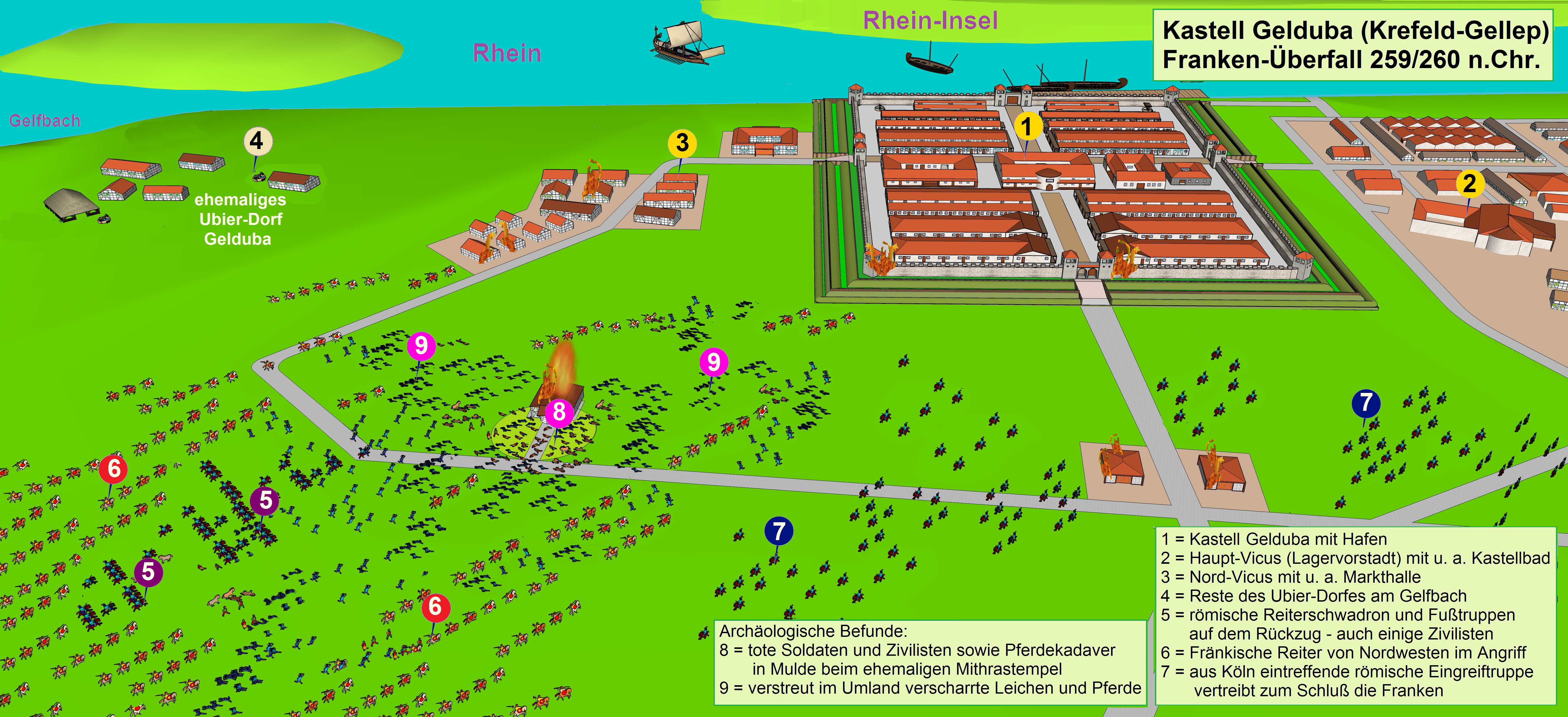 Kastell-Gelduba, Frankenüberfall 259 n. Chr.